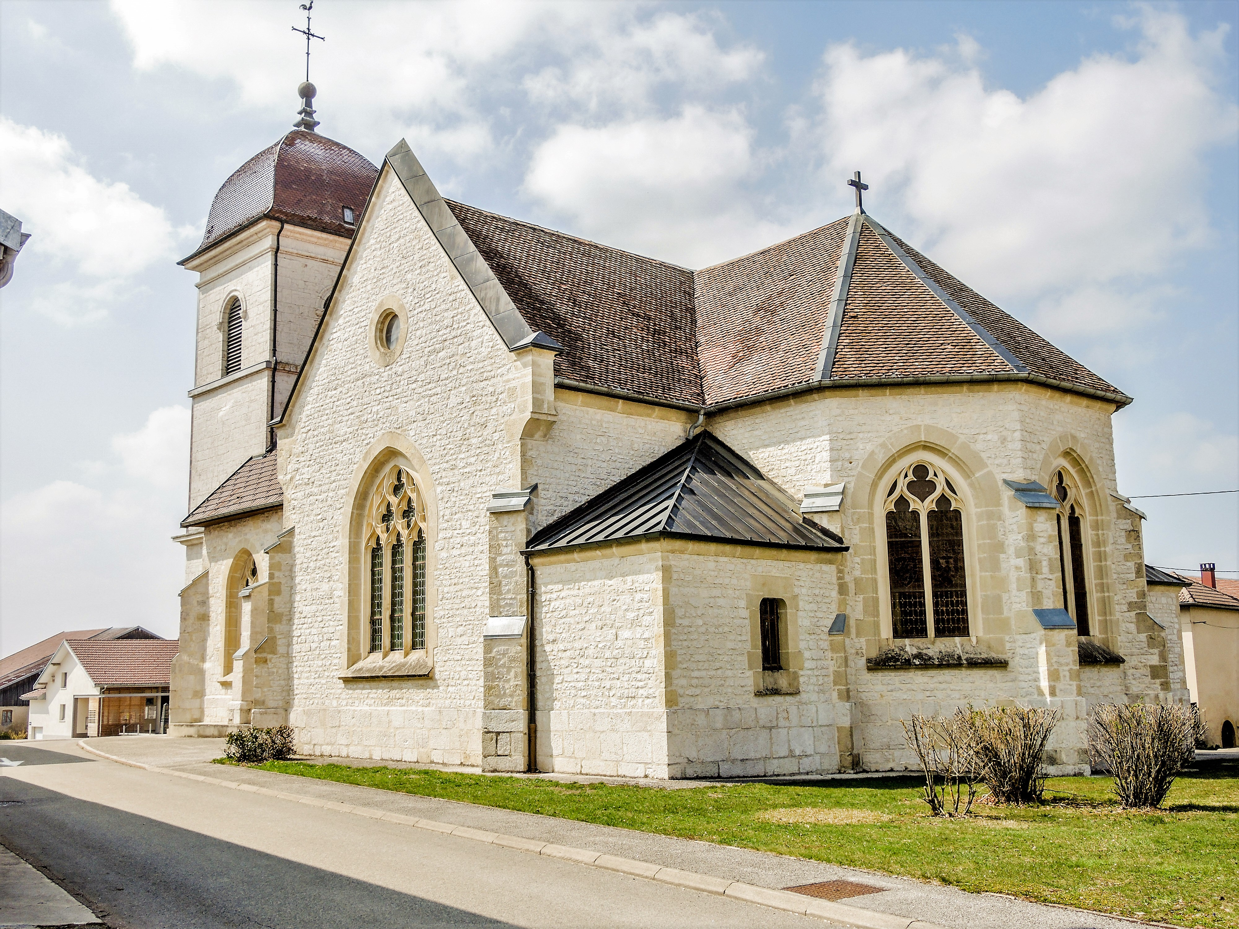 Eglise Saint-André